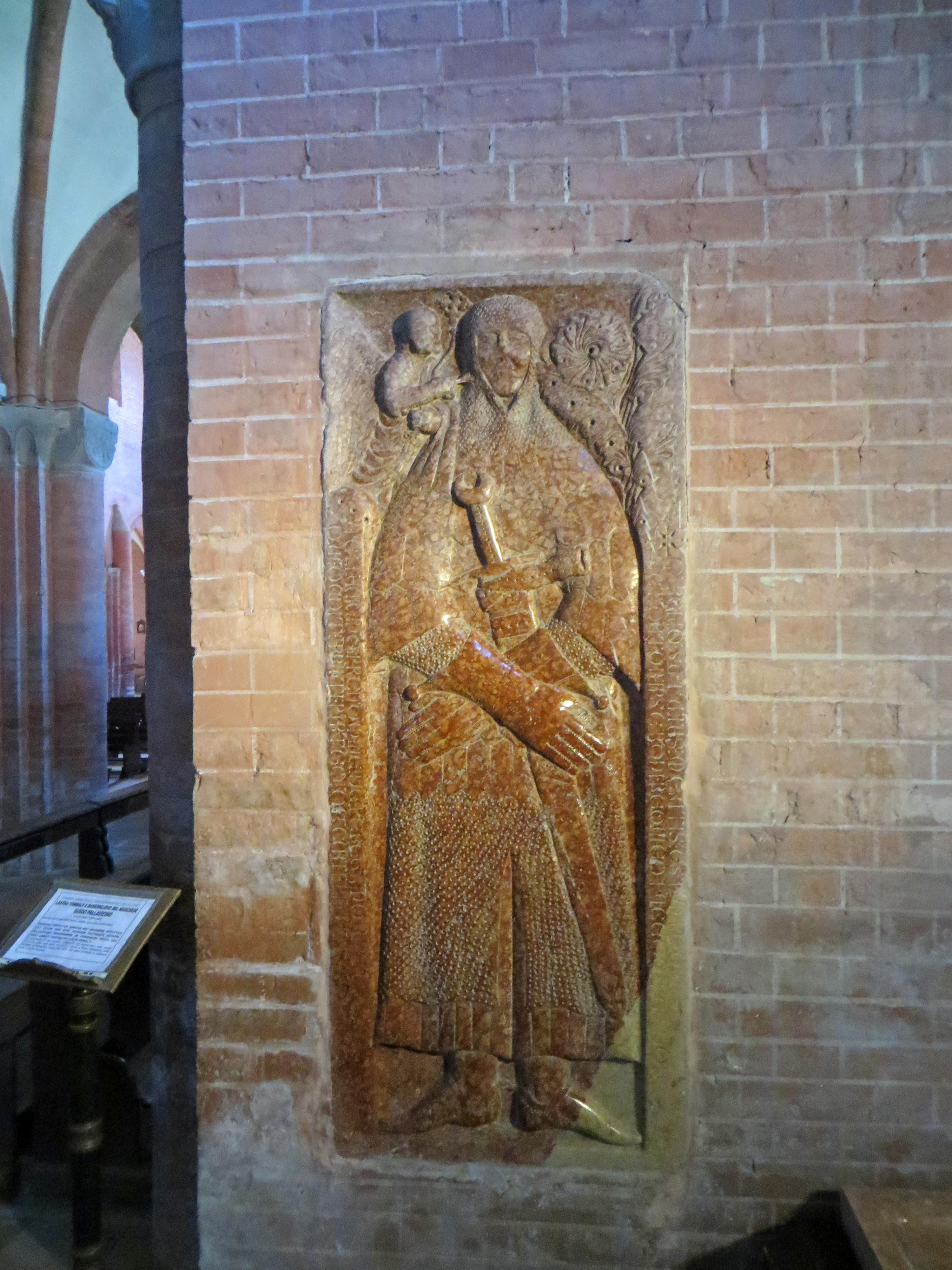 Abbazia di San Bernardo (Fontevivo) - Lastra sepolcrale di Guidone Pallavicino